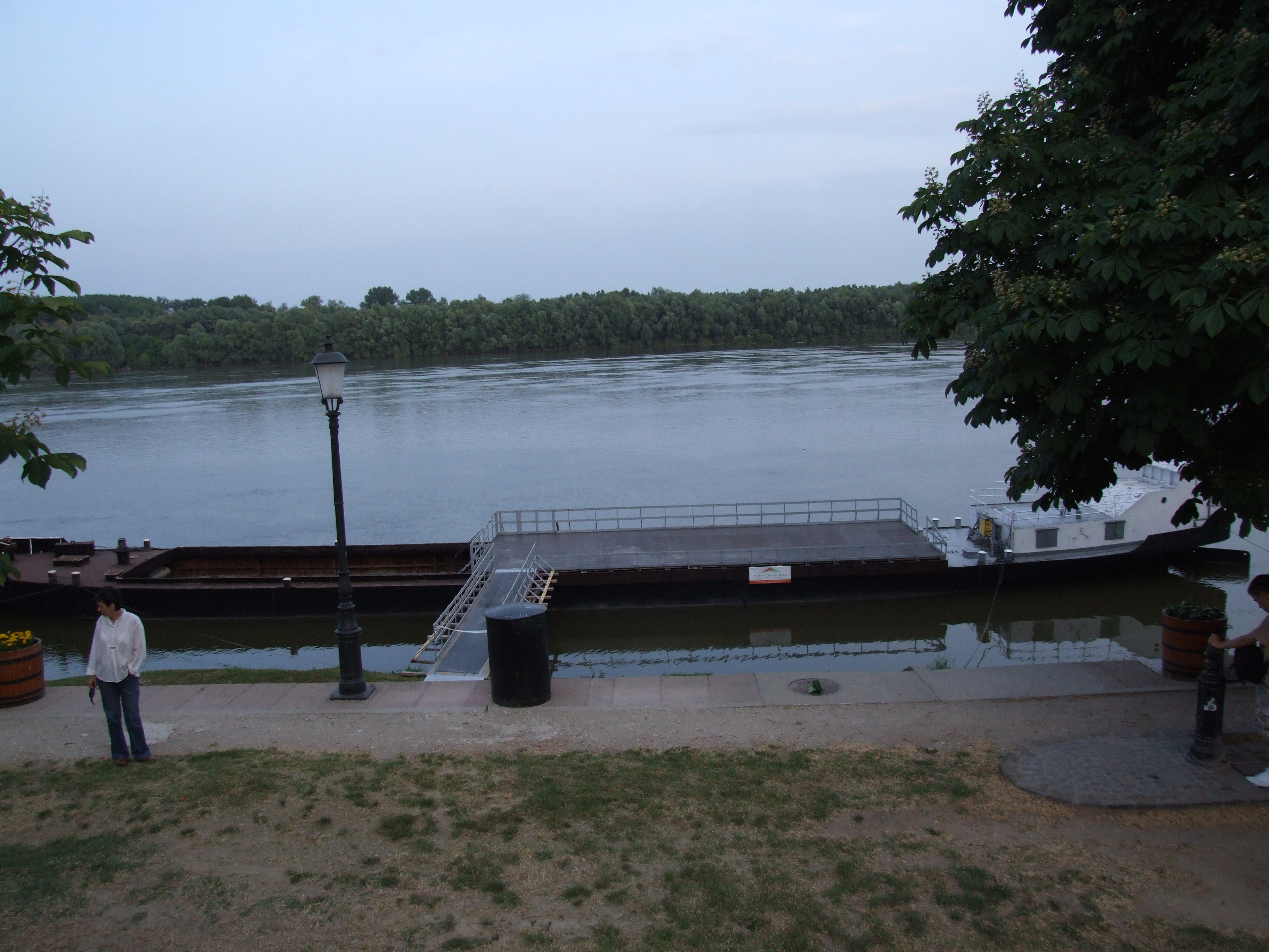 Víziszínpad